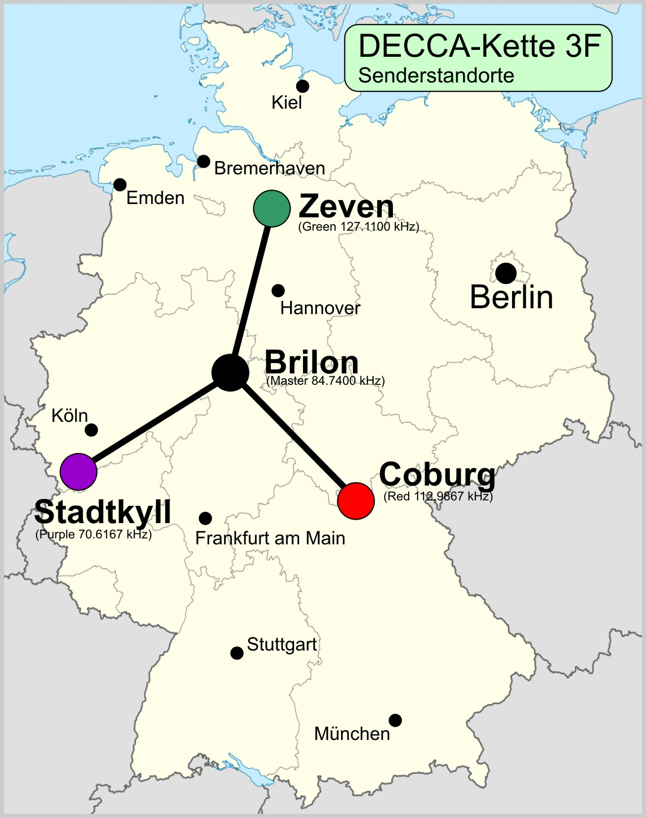 DECCA-Kette 3F Brilon-Coburg-Zeven-Stadtkyll zur Flugnavigation im Berlin-Korridor 1952-1992